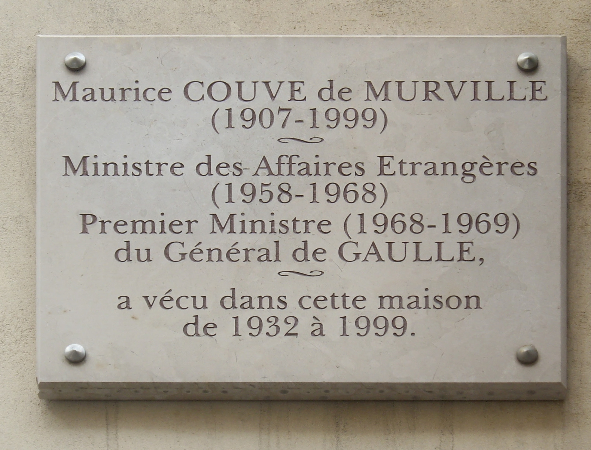 Plaque apposée au n° 44 de la rue du Bac, Paris 7e, où vécut l'homme politique Maurice Couve de Murville (1907-1999) de 1932 à 1999.